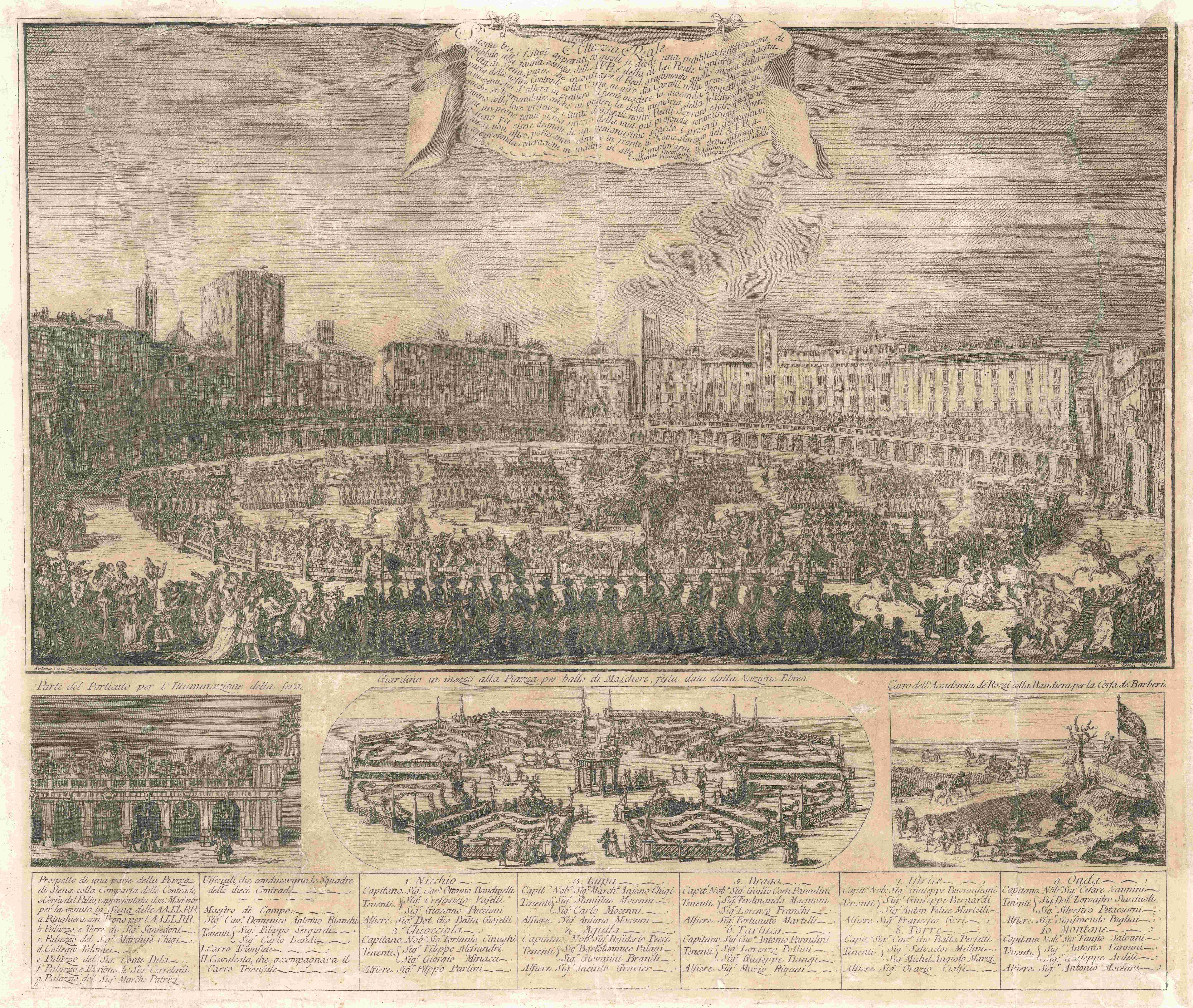 Le LL.AA.RR.II Leopoldo I d'Asburgo-Lorena, Granduca di Toscana e Maria Luisa di Borbone-Spagna, Granduchessa di Toscana, assistono al Palio di Siena offerto il loro onore, dal Circolo degli Uniti 14 Maggio 1767